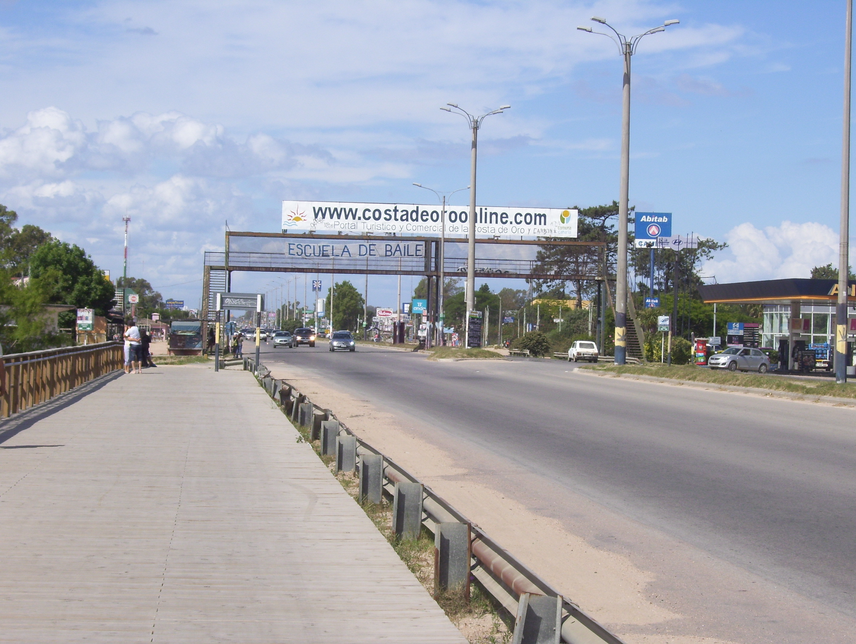 Avenida Giannattasio km 21 (Lagomar) Ciudad de la Costa-Uruguay